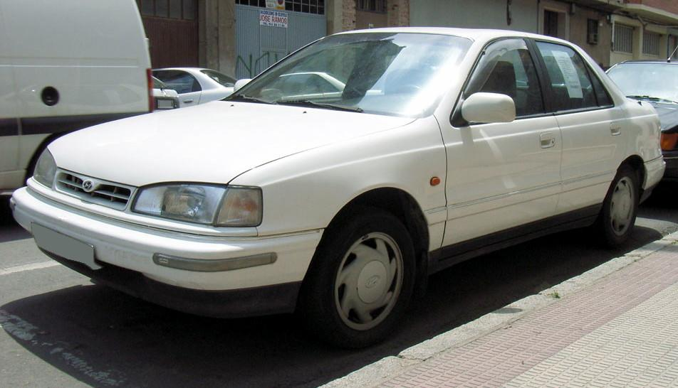 Circa 1993 Hyundai Lantra for sale.